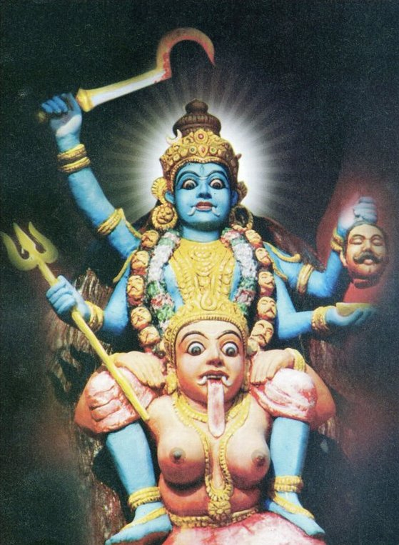 കൽക്കുളത്തുകാവിലെ ദേവീപ്രതിഷ്ഠ (ശിലാവിഗ്രഹം) നോക്കി മനസ്സിലാക്കി ക്ഷേത്ര ഗോപുരത്തിൽ കോൺക്രീറ്റിൽ ഉണ്ടാക്കിയ കൽക്കുളത്തുകാവിലമ്മയുടെ പ്രതിരൂപം.